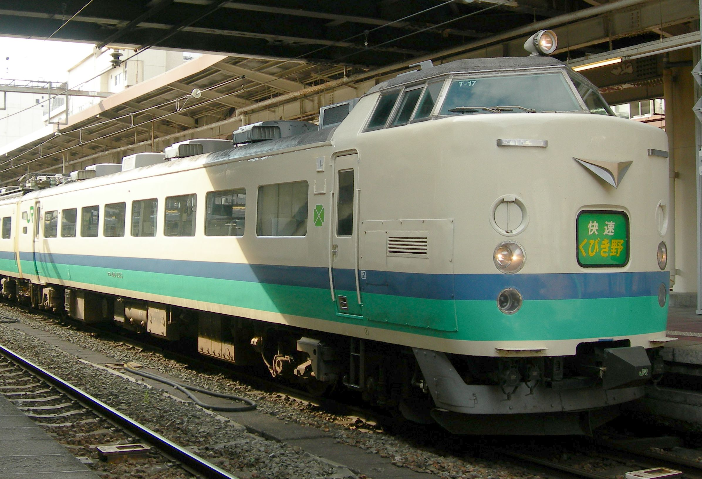 JR東日本 485系